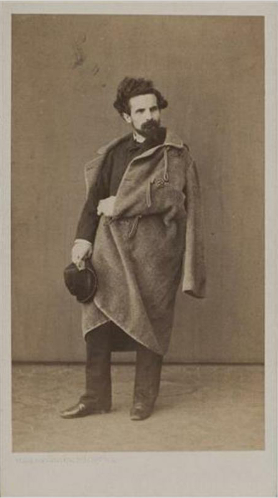 Fotografie von Victor Zeppenfeld (1834–nach 1883), Arnold Overbeck, Gebr. G. & A. Overbeck in Düsseldorf